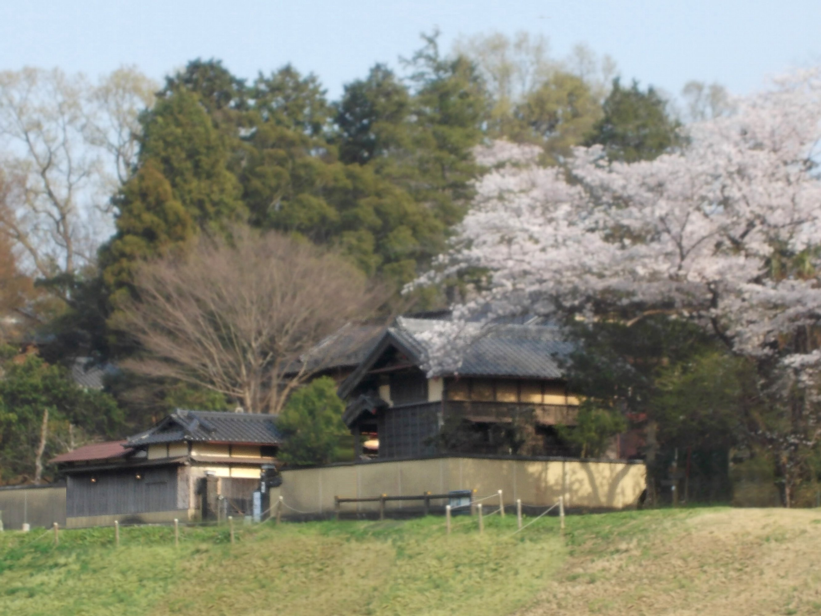 利根運河・新川